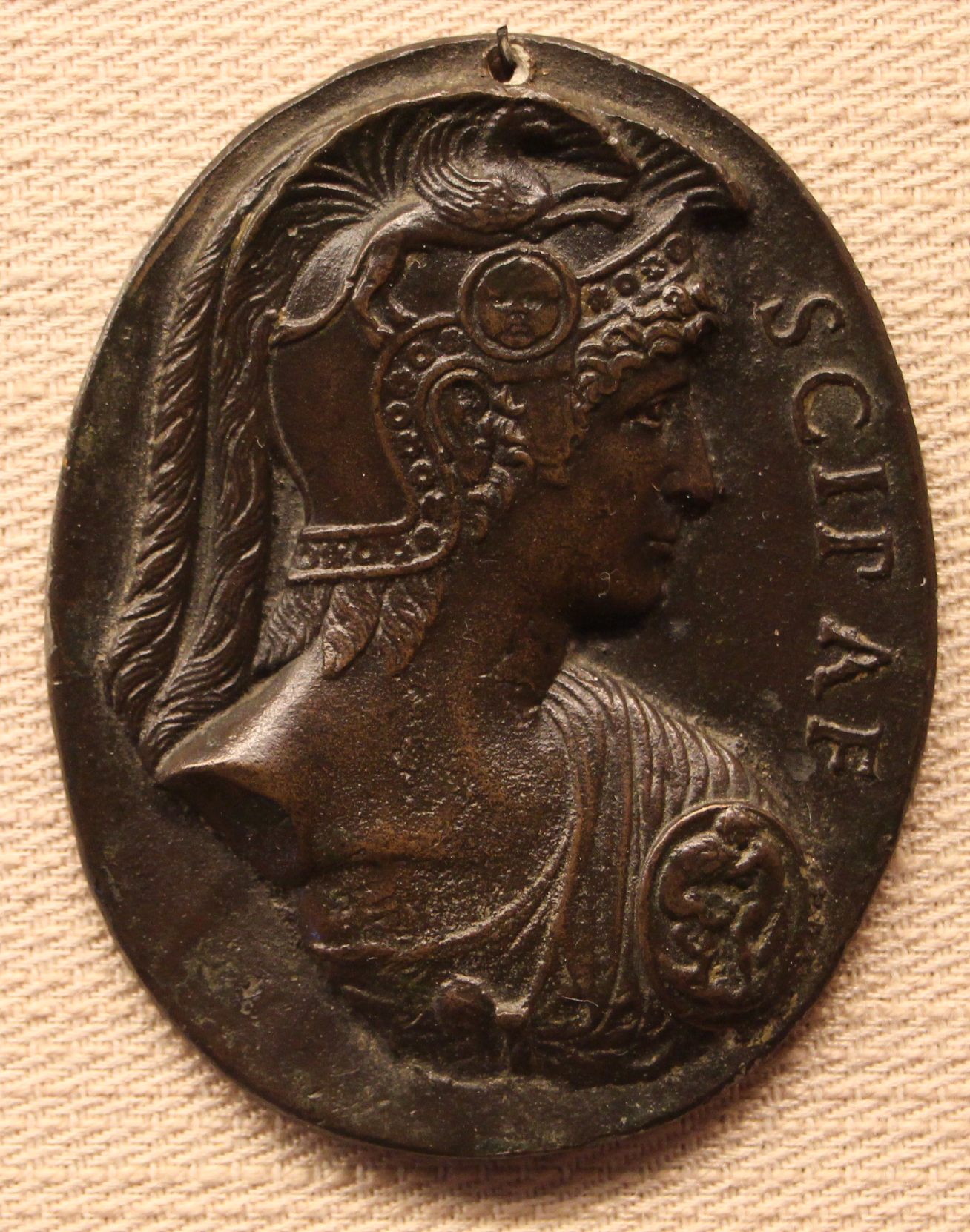 Placchette rinascimentali e barocche